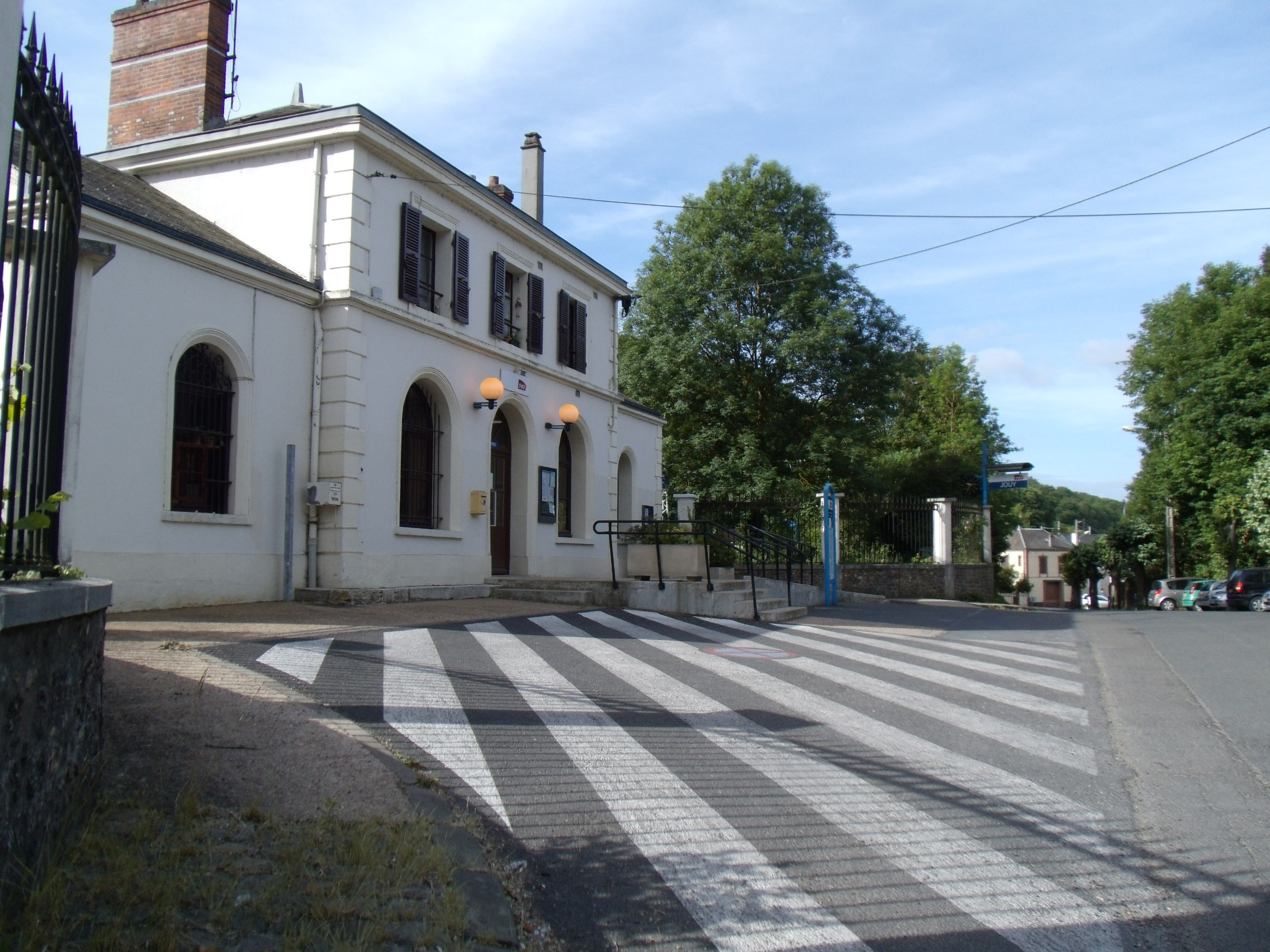 Le bâtiment voyageurs de la gare de Jouy (28)